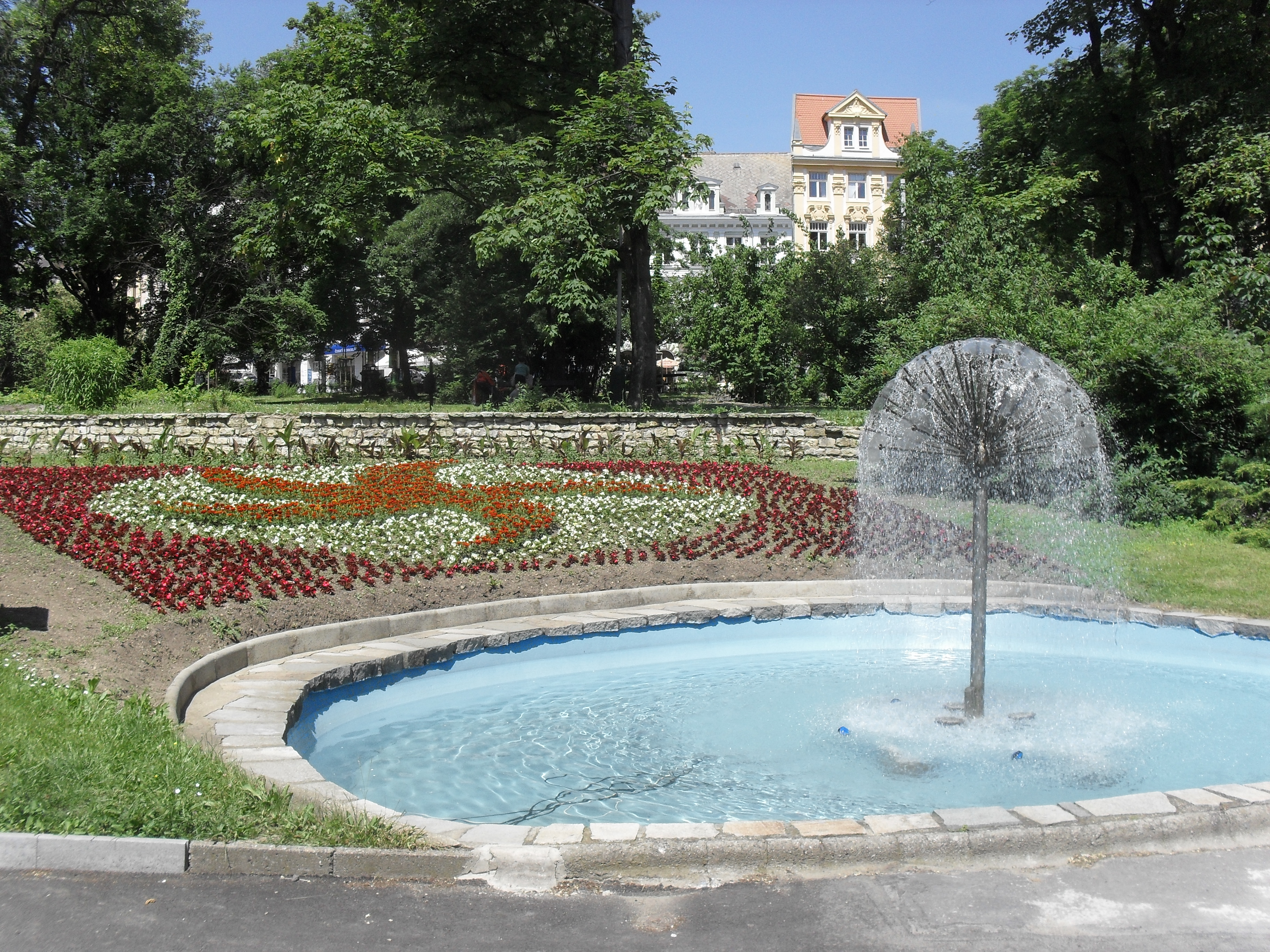 Fontána Pampeliška, Lázeňský park, Teplice.